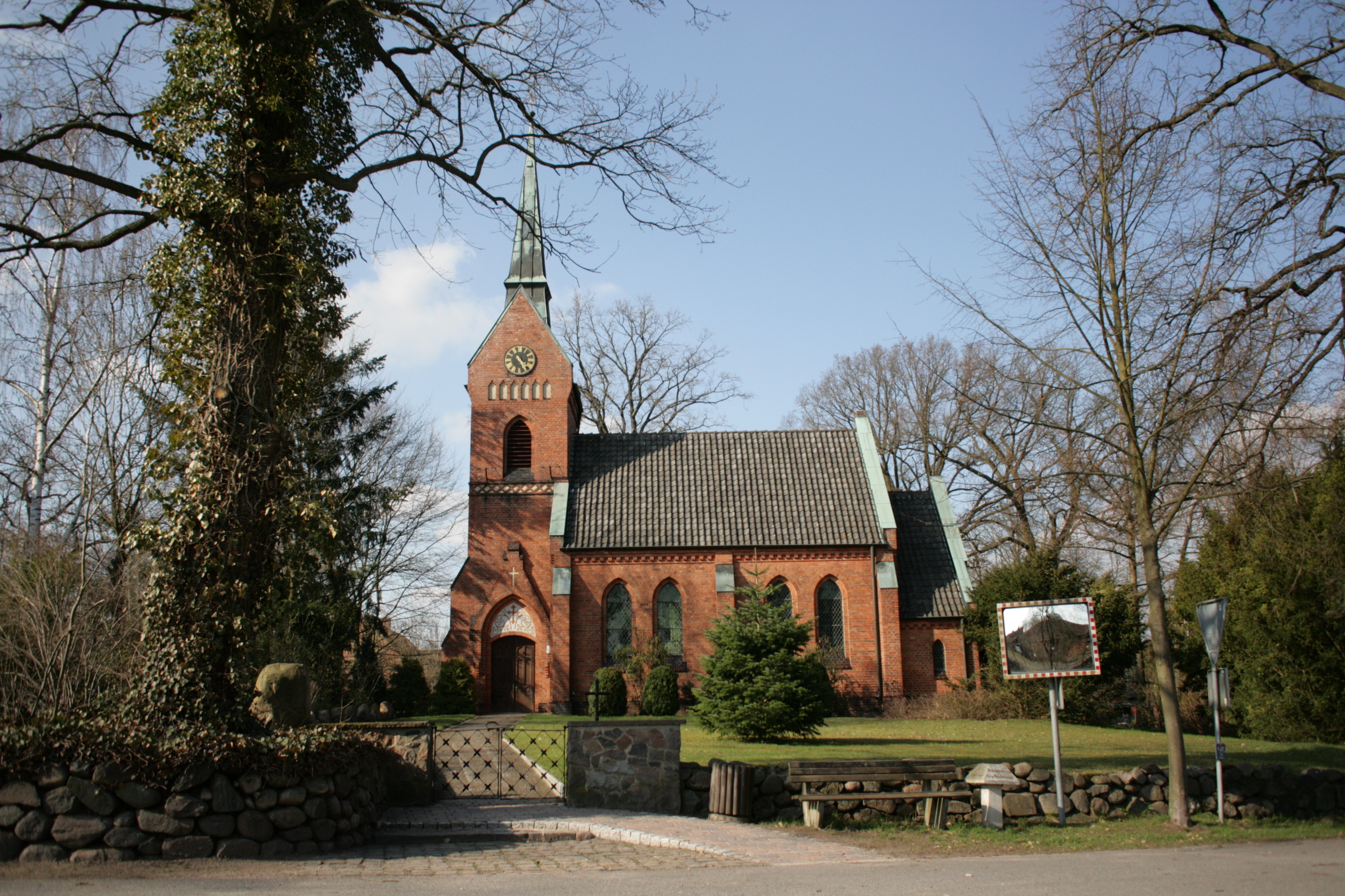 Kirche in Höver (Niedersachsen)